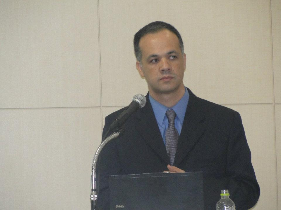 אלון (ניסים) כהן נואם בכנס IDC בטוקיו 2001